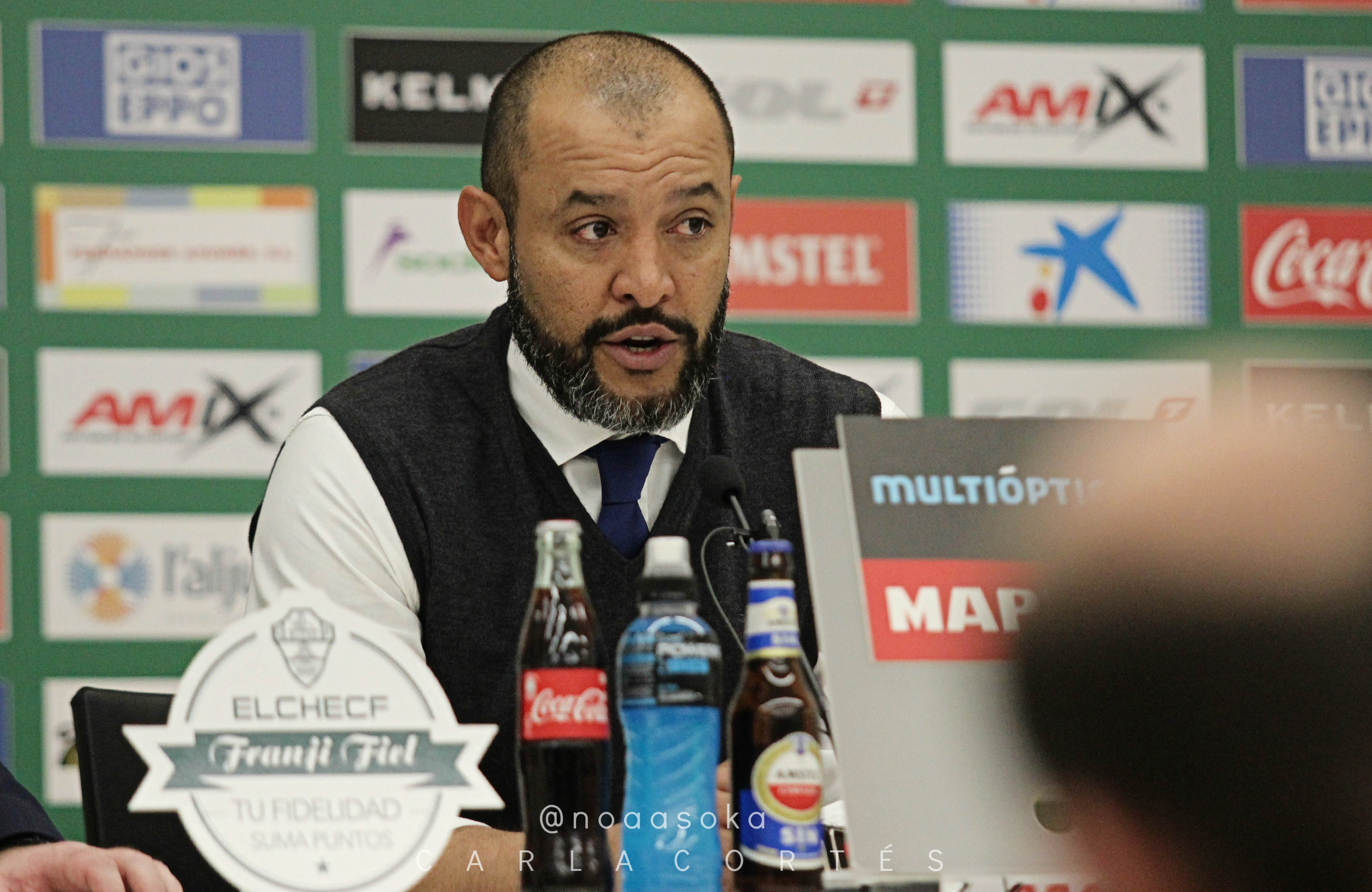 Nuno Espírito Santo as a coach of Valencia CF in 2015Fotografía: Carla Cortés / @noaasoka